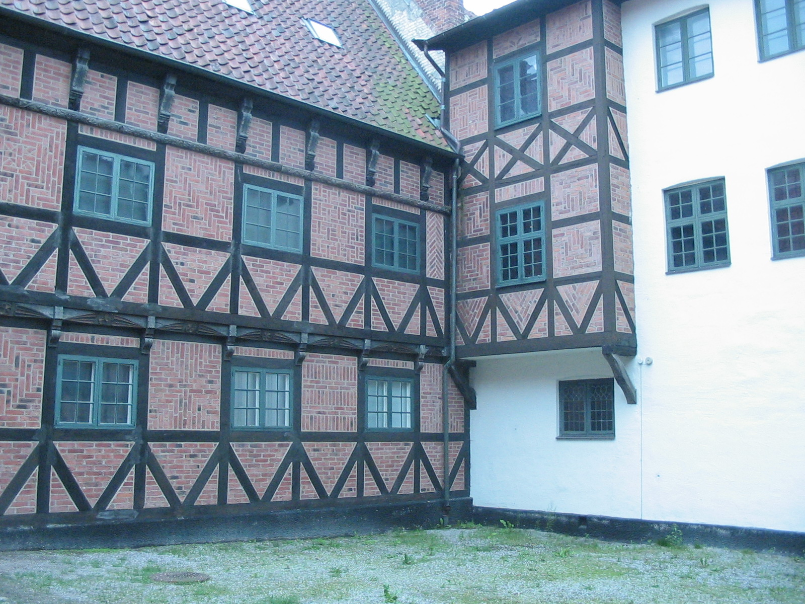 Een eigen gemaakte foto van Kulturen, een oud museum in Lund.